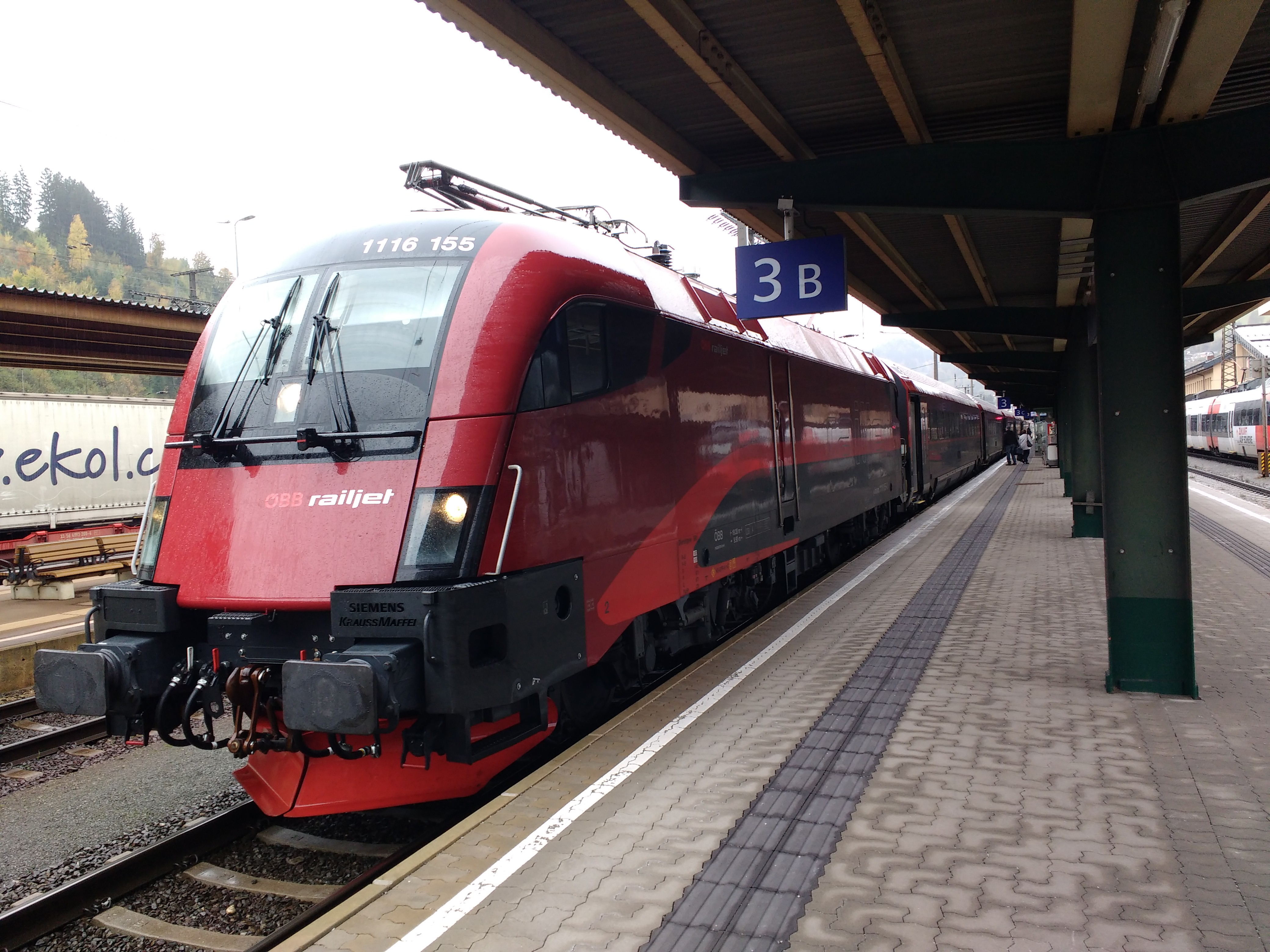 ÖBB IC691 als RJ-Garnitur in Schwarzach/St.Veit